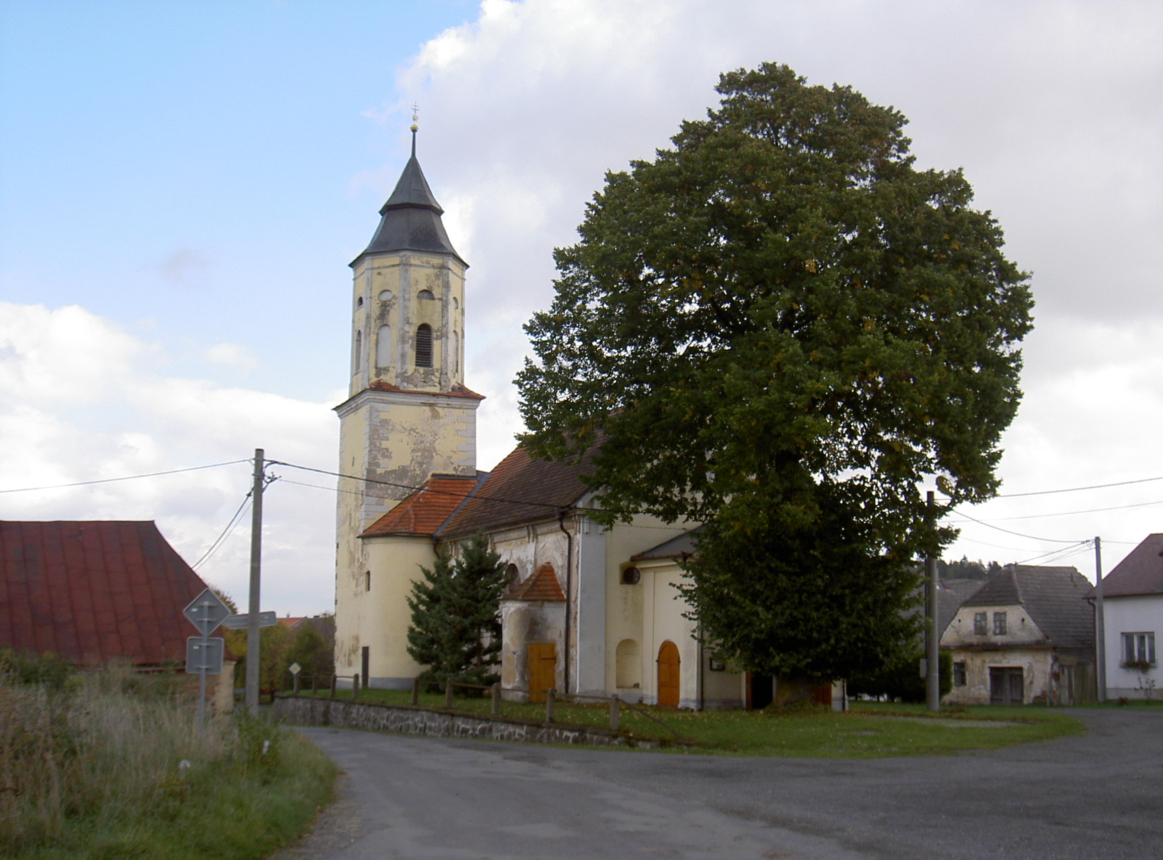 Kirche in Mutěnín